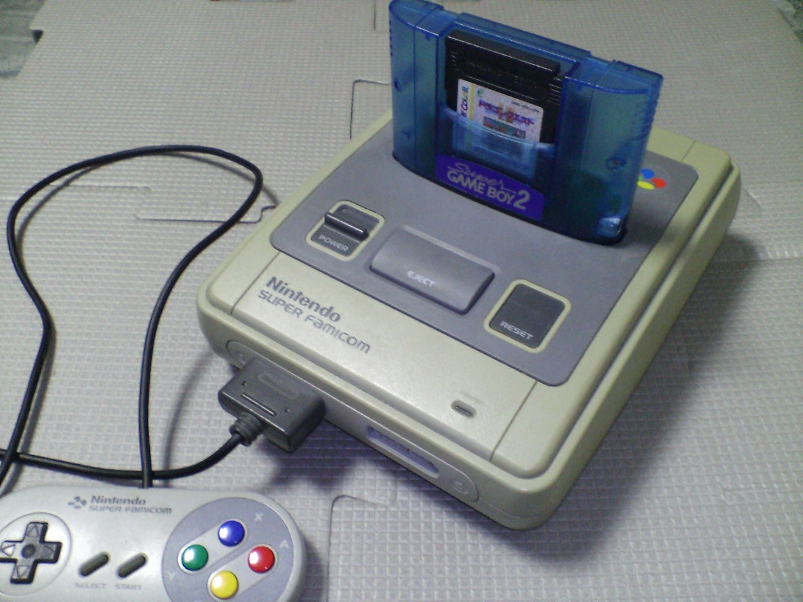 Super Game Boy usage sample